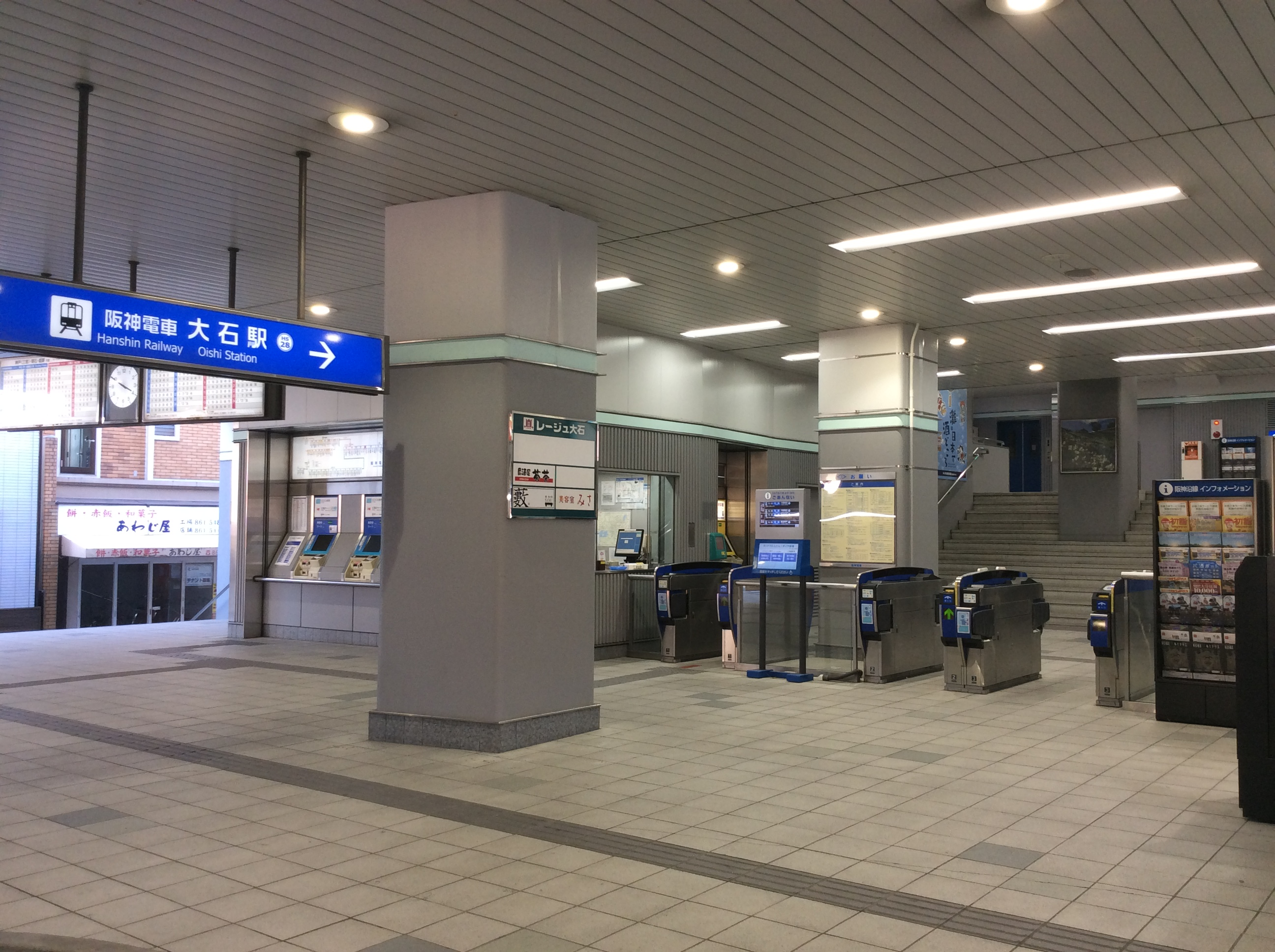 阪神大石駅改札口